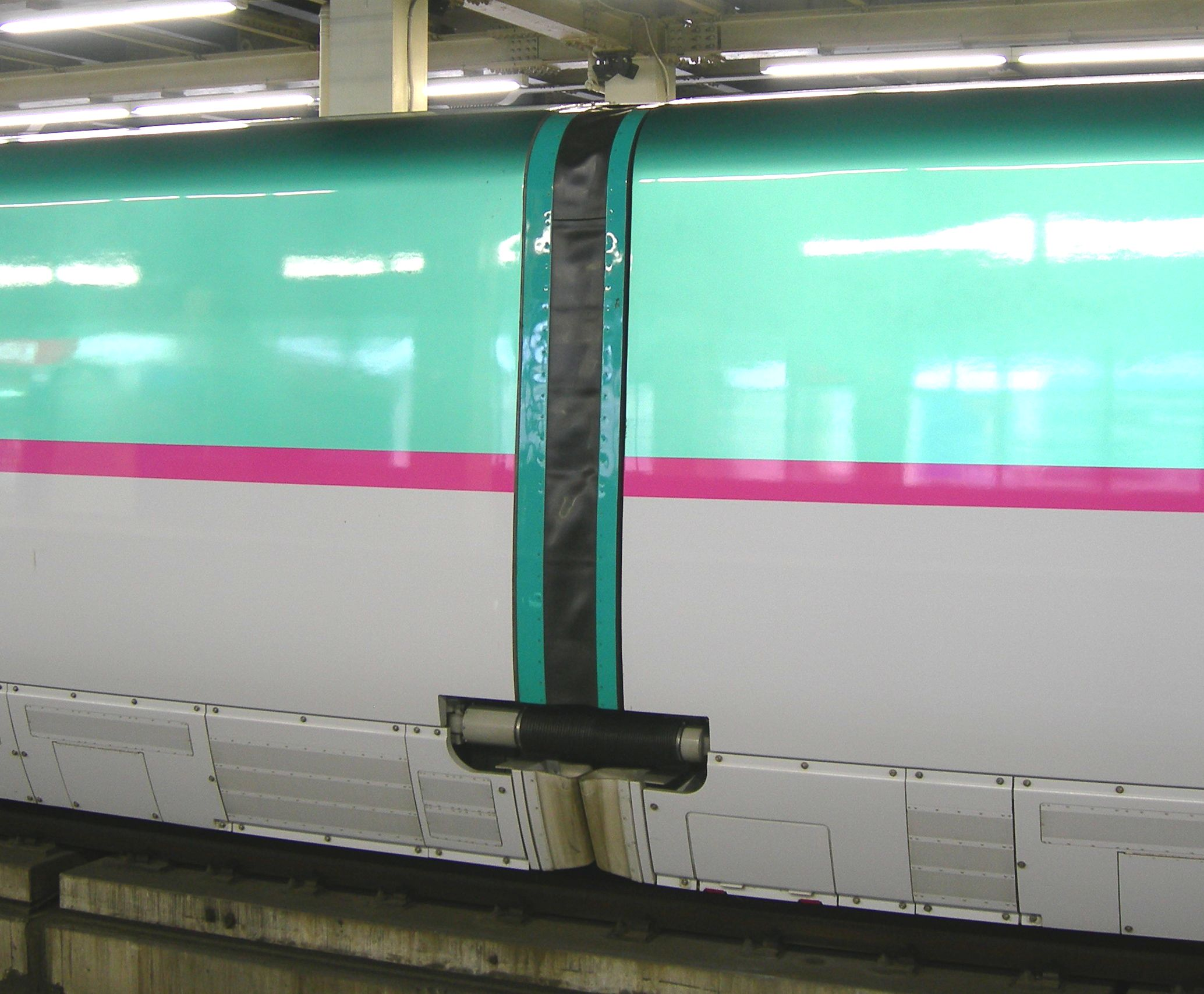 新幹線E5系の車両連結部分の全周幌 車体間ダンパー